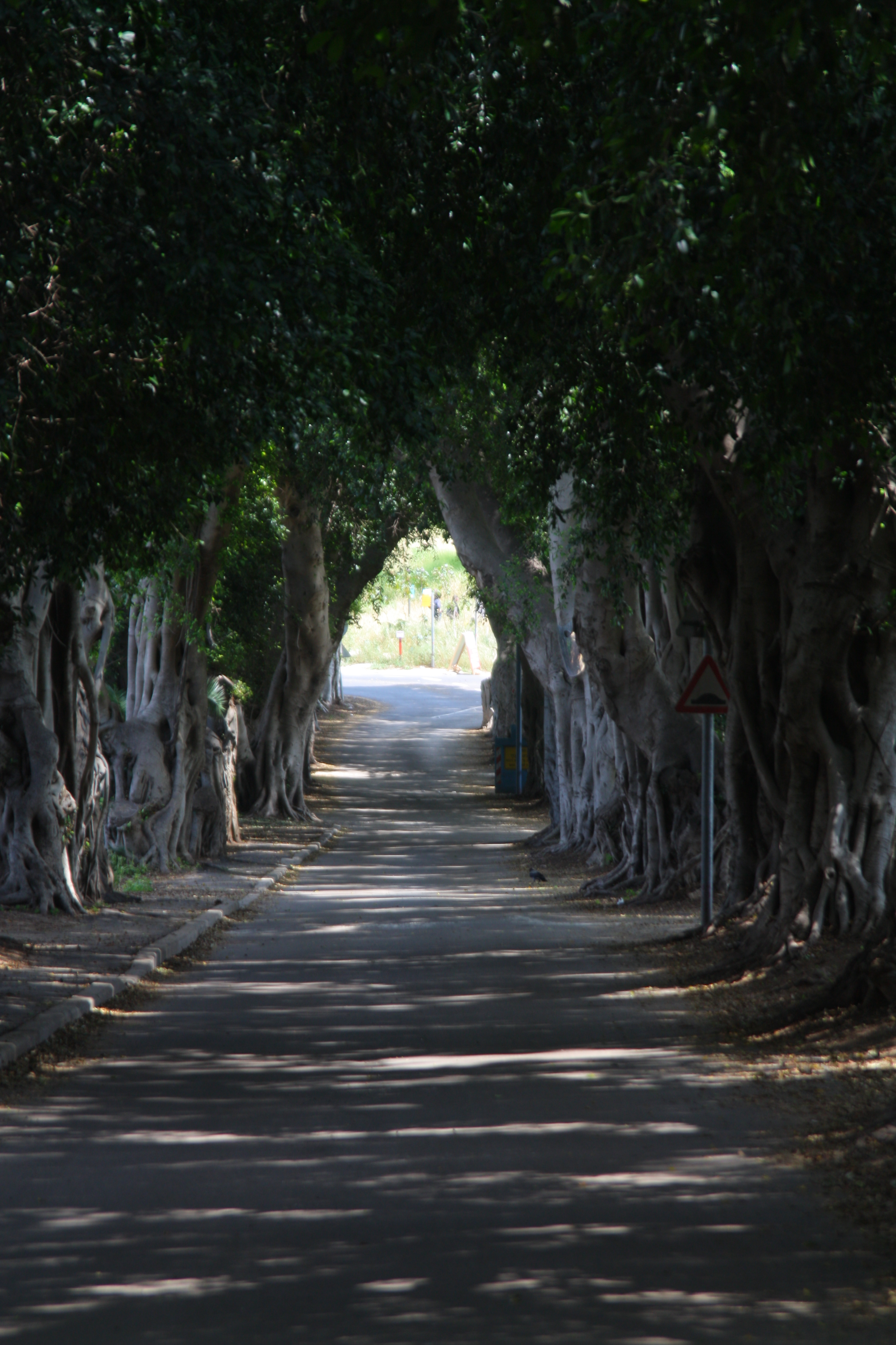 שדרת הפיקוסים בכניסה לביתן אהרון Bitan Aharon ficus boulevard